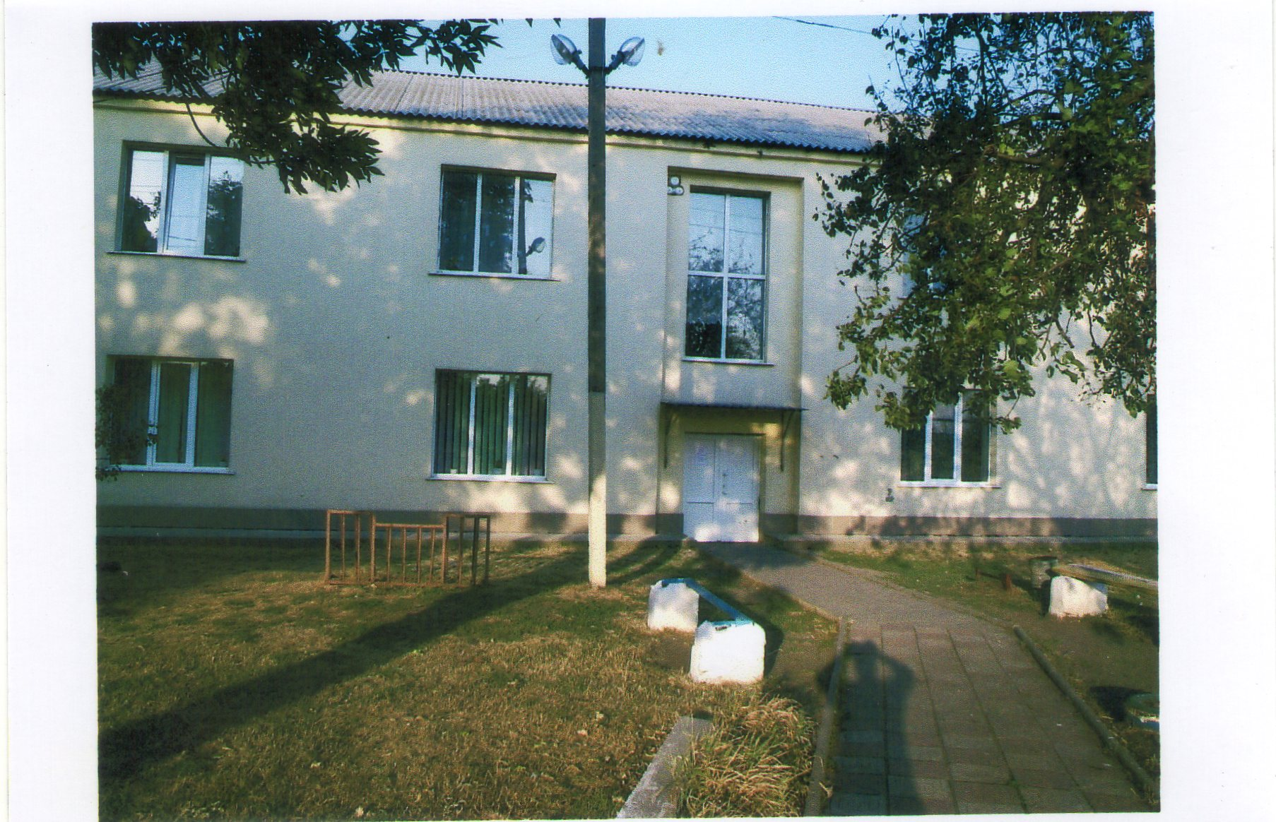 Новоборисівська сільська публічна бібліотека знаходиться в приміщенні Новоборисівської загальноосвітньої школи І—ІІІ ступенів, с. Новоборисівка, Великомихайлівського району Одеської області